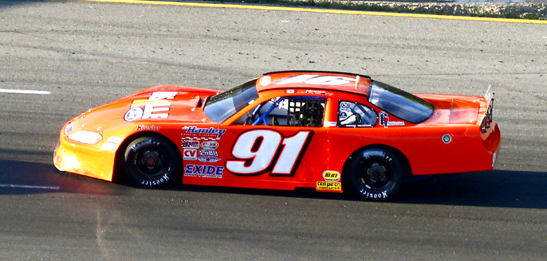 Patrick Laperle - Photo Paul-Émile Poulin-Jacques